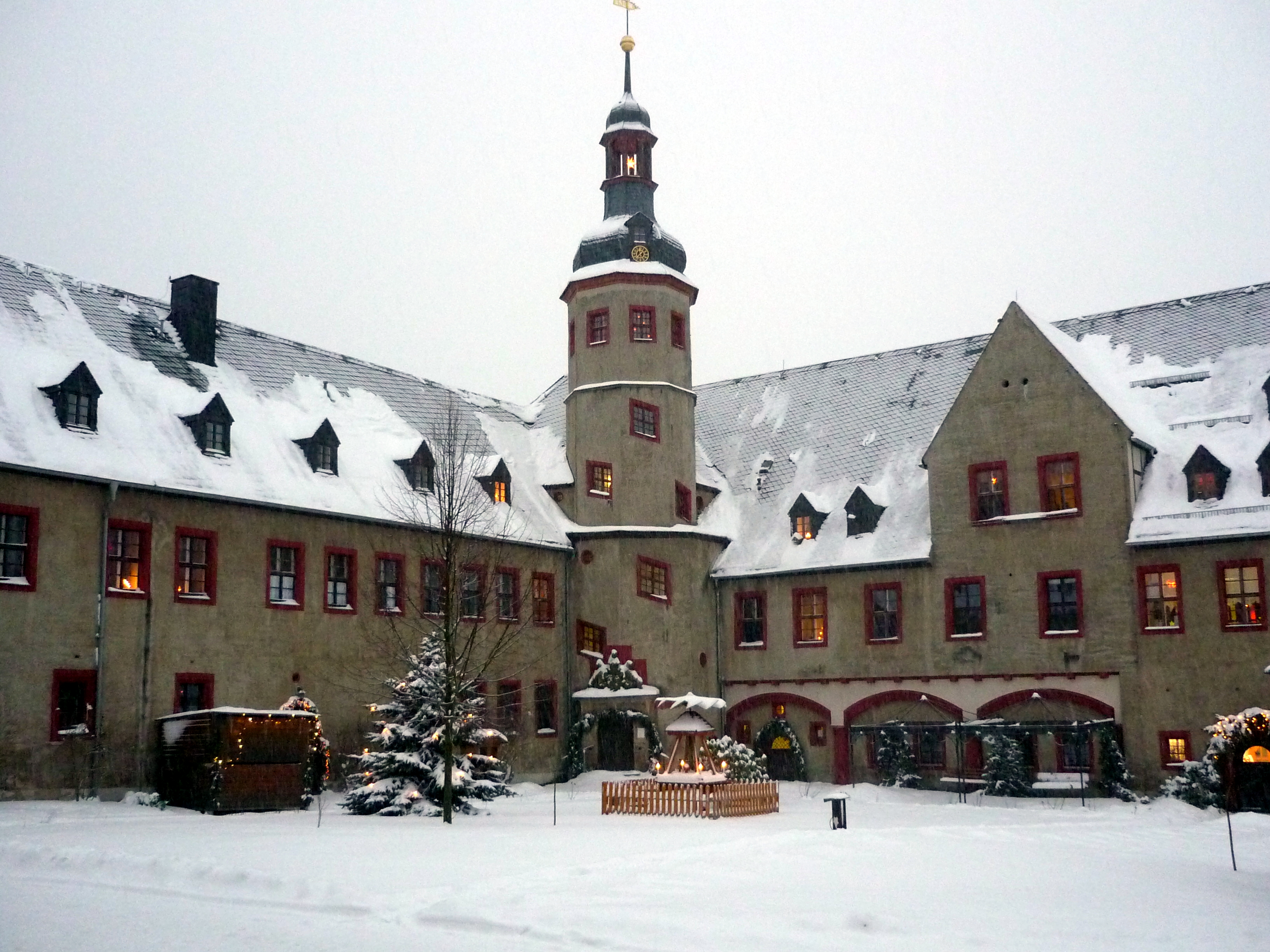 Aufnahme vom Hof 30. Dezember 2014